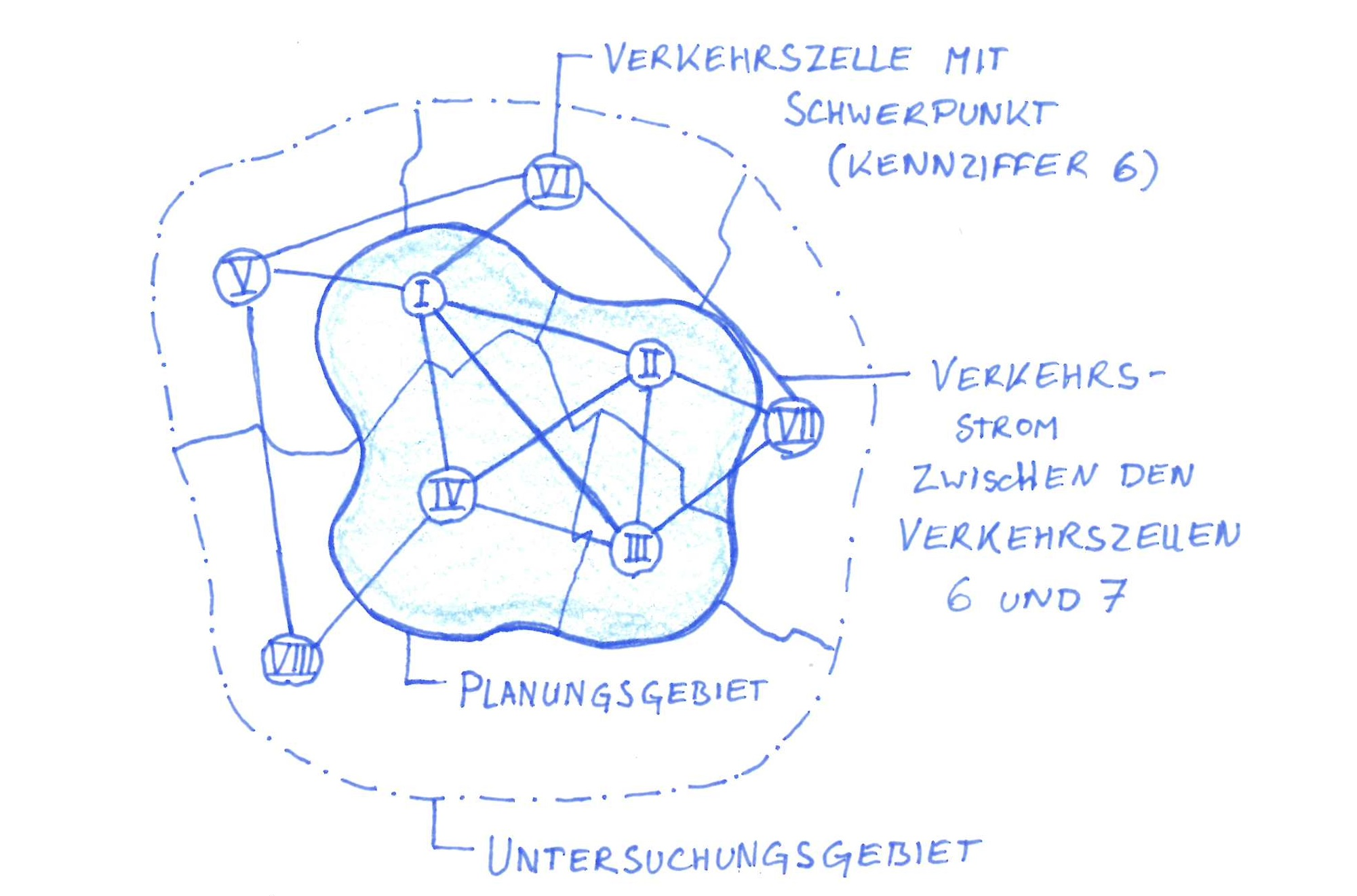 Prinzipskizze eines Untersuchungsgebietes, das in Verkehrszellen eingeteilt ist.